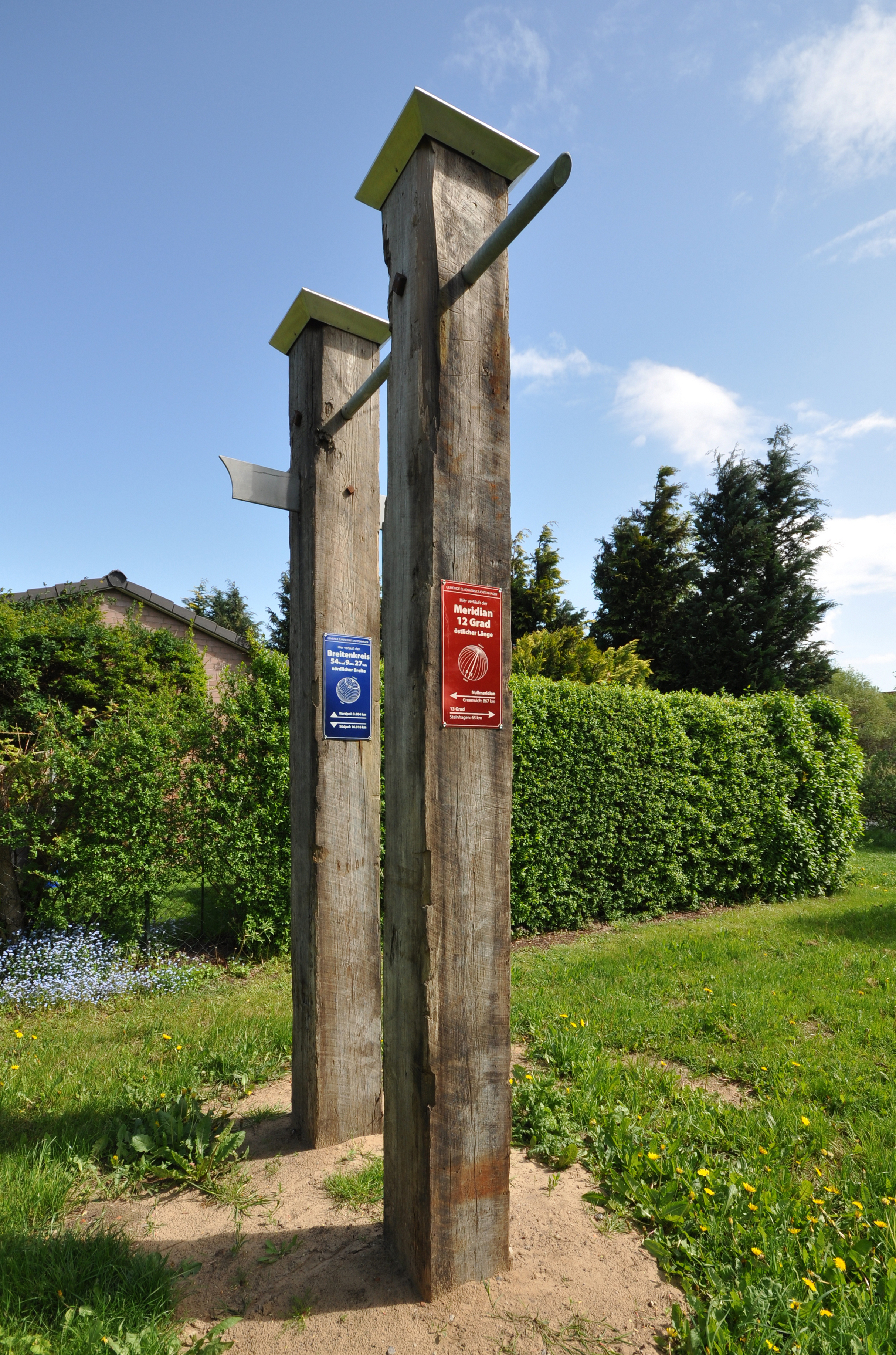 meridian latitude marking in Elmenhorst